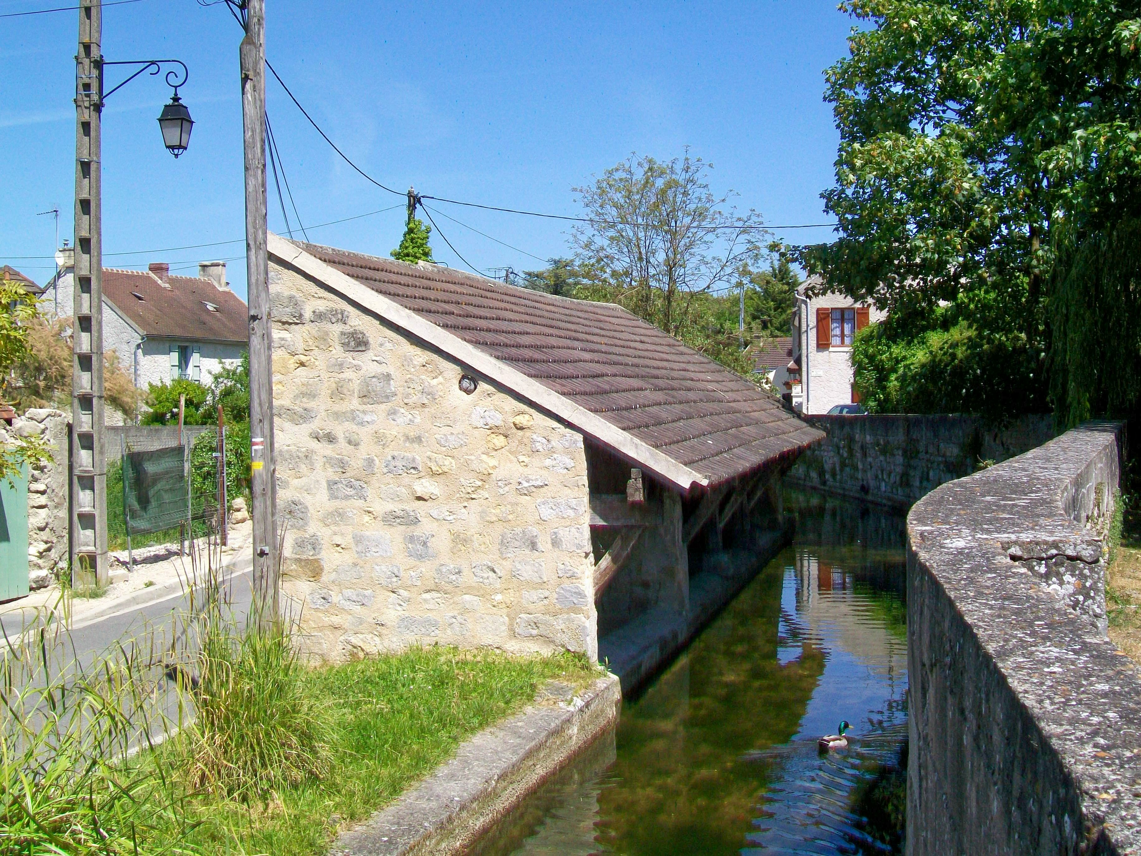 Le lavoir du hameau de Baillon, sur le canal, rue des Marais.